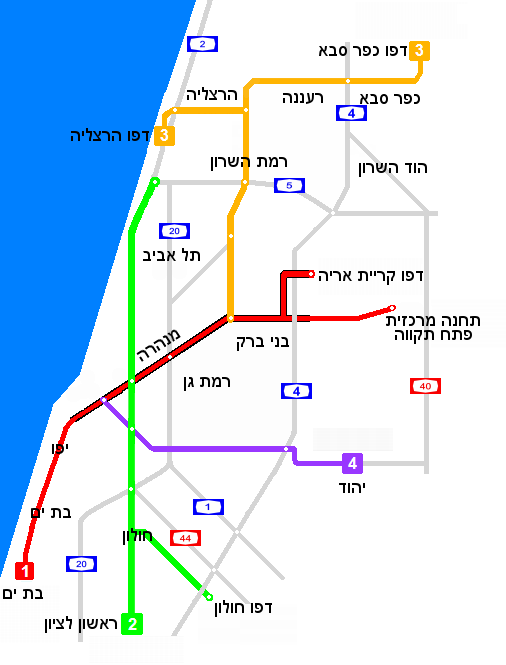 S-Bahn Tel aviv